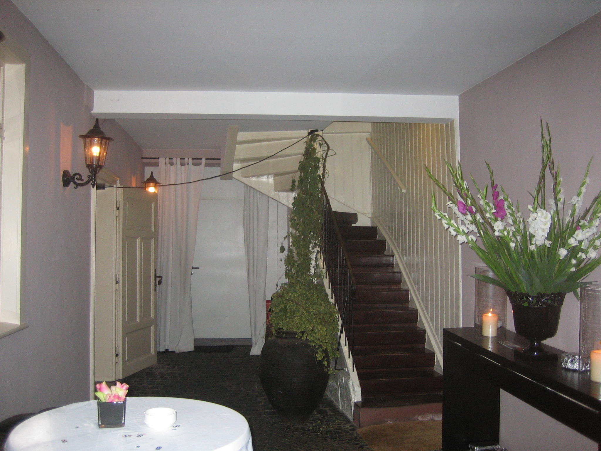 Kulturdenkmal Acker 10 in Mainz-Altstadt: Torfahrt der nachbarocken Hofanlage innen.